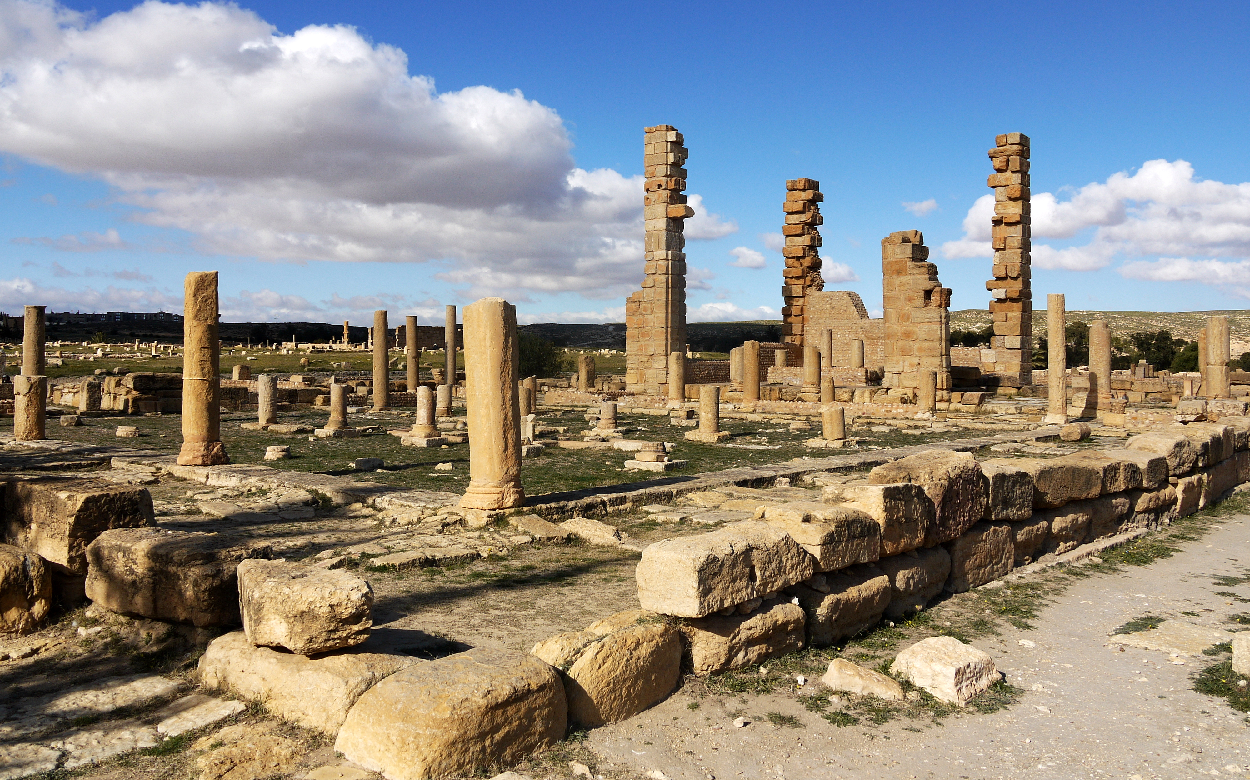 Photographie personnelle sur le site de Sbeïtla (Tunisie). Elle représente l'église de Saint Servus, aménagée sur un temple païen.